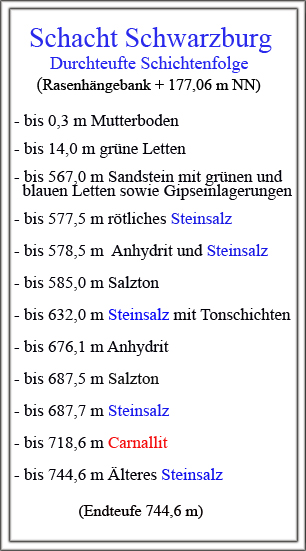 Geologisches Schichtenprofil Schacht Schwarzburg.